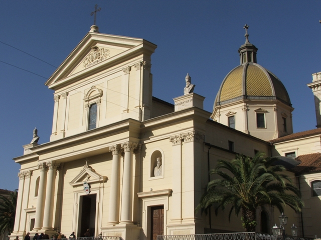 Lamezia Terme: la bellissima facciata, rifatta in stile neoclassico nel secolo scorso, della Cattedrale del 1642. Autore: Francesco Cataudo